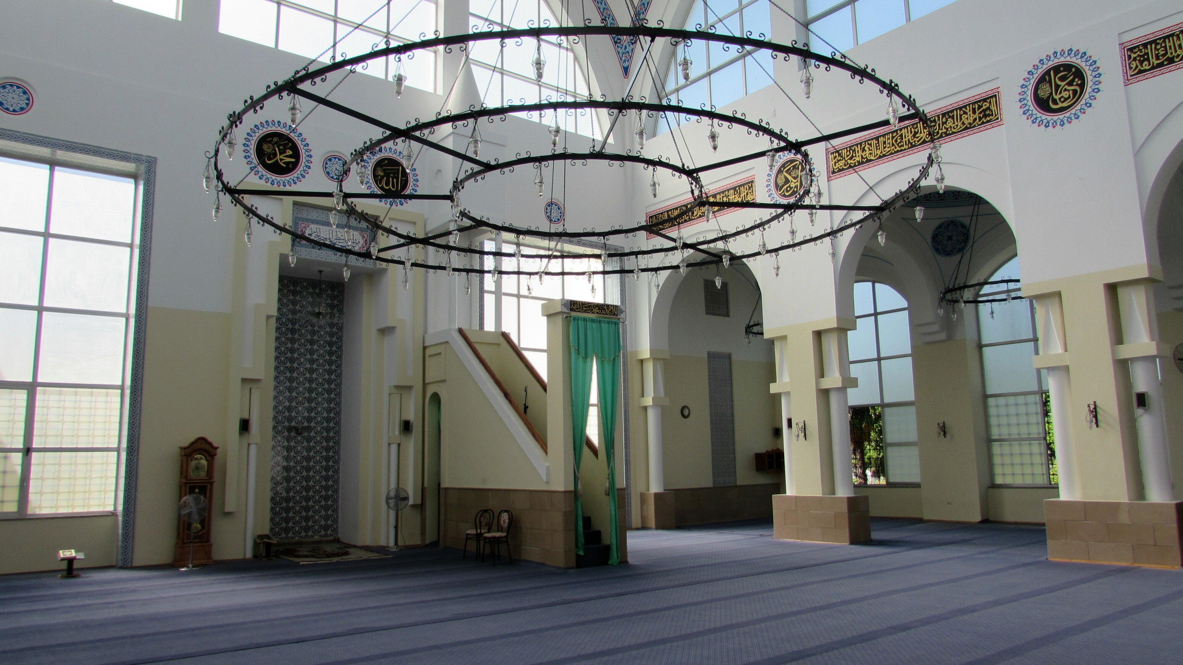 SkodraEbu-Bekr-MoscheeInnen2014